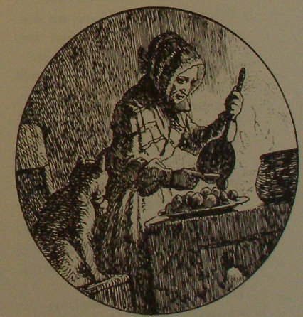 Illustration af æbleskiver der vendes ud af en æbleskivepande fra Johan Krohns Peters Jul (1866). Illustrationen er skabt af broderen.